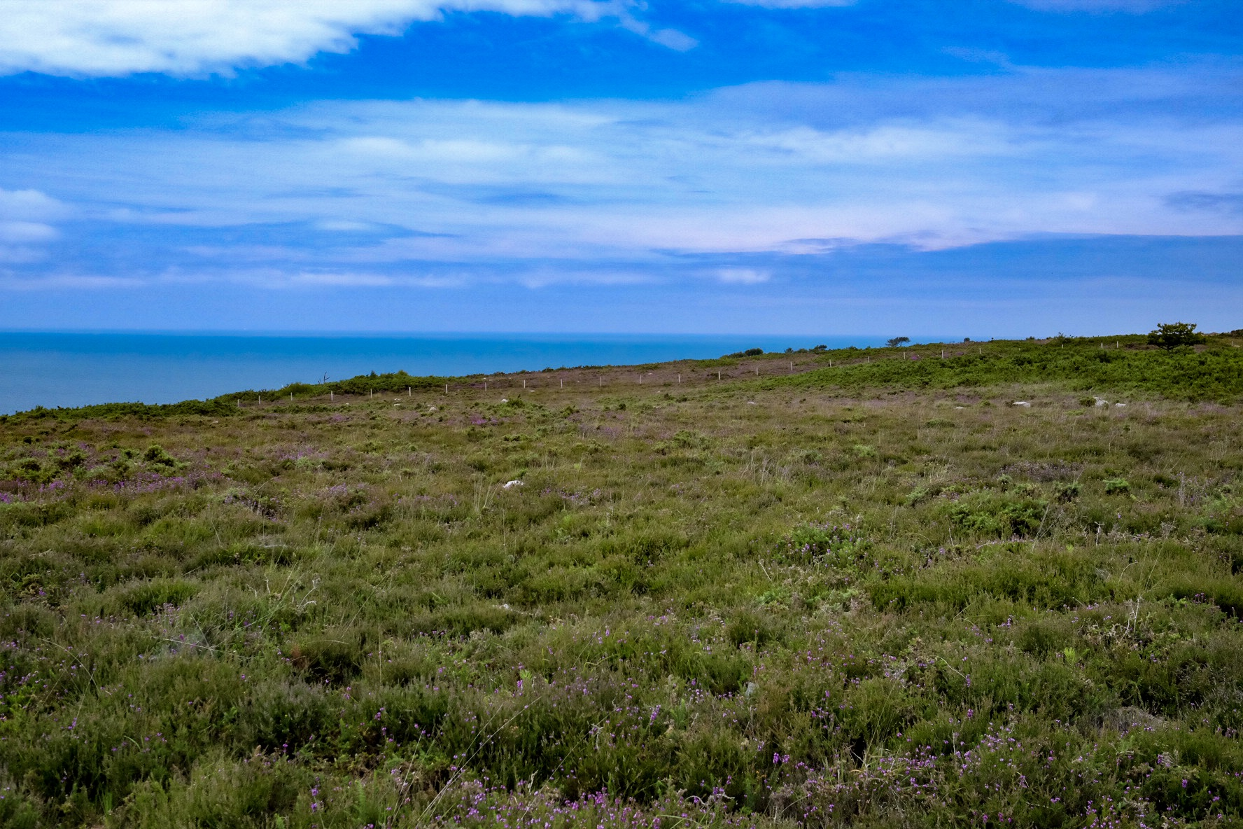 Paysage des landes du Bruley, à Fermanville.